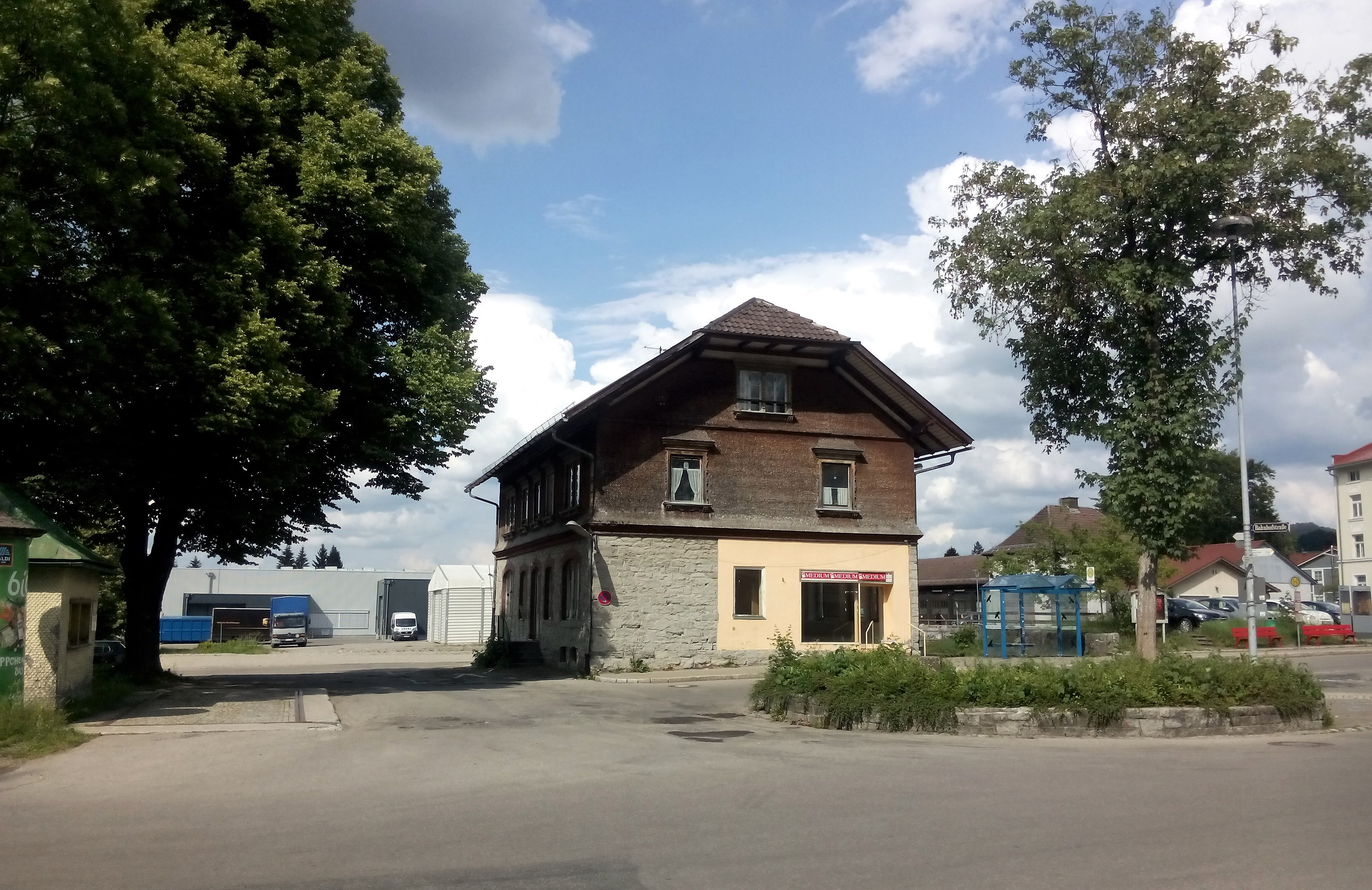 Baulicher Zustand. Rückwärtige Güterschuppen sind abgerissen.